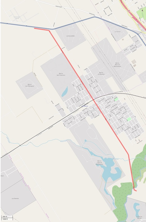 Ferrocaril Decauville Molino Bancalari en la zona Manzanares, Buenos Aires (OpenStreet Map)